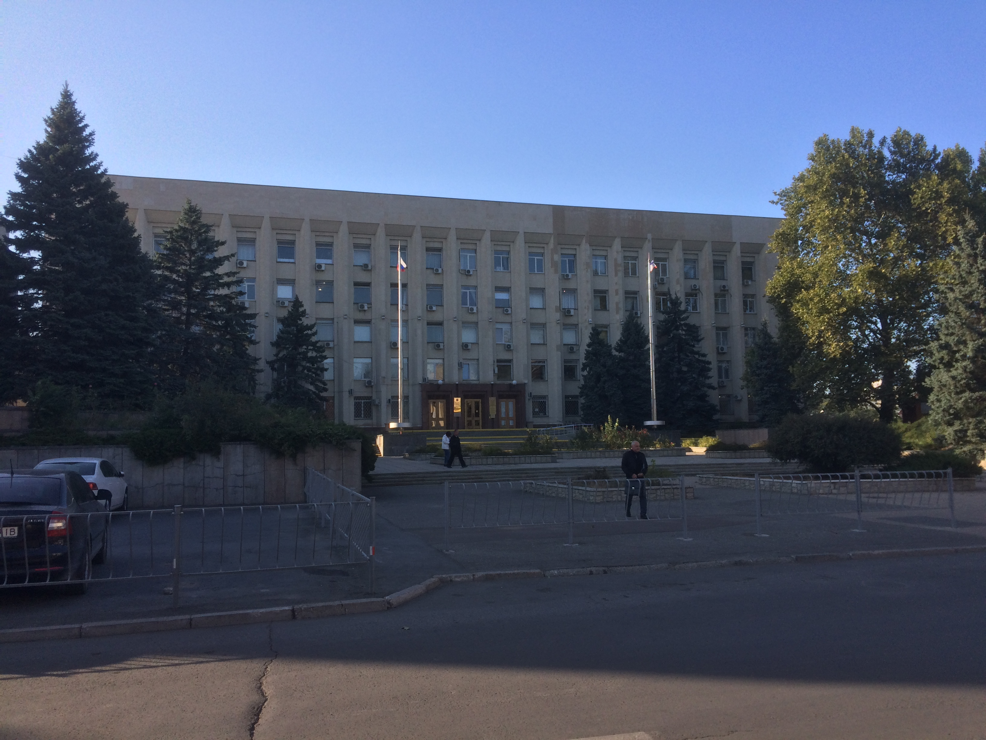 Симферопольский городской совет